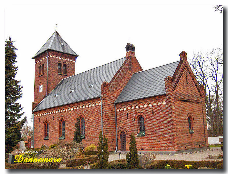 fra sydøst